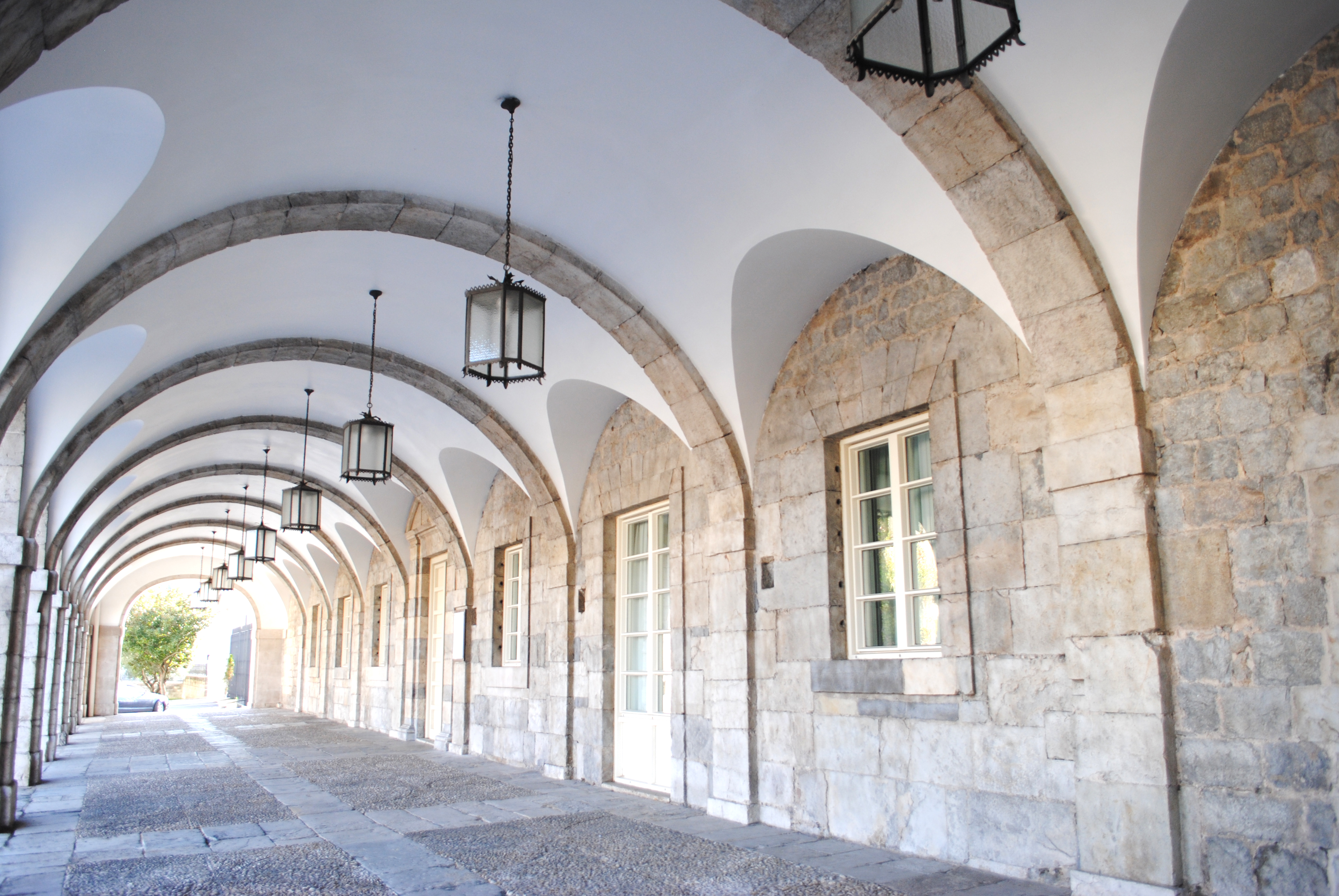 Portal del antiguo hospital